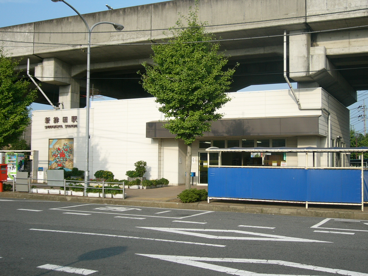 Shinhokota Station